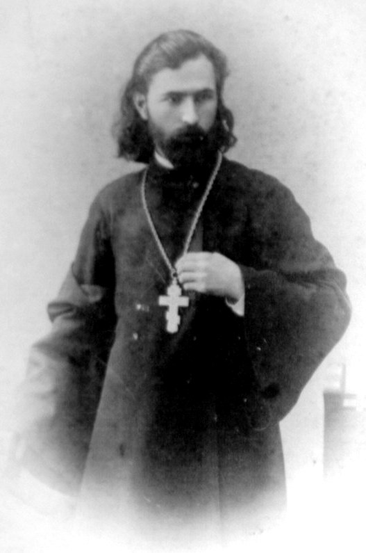 Русский священник и политический деятель Георгий Аполлонович Гапон (1870-1906)